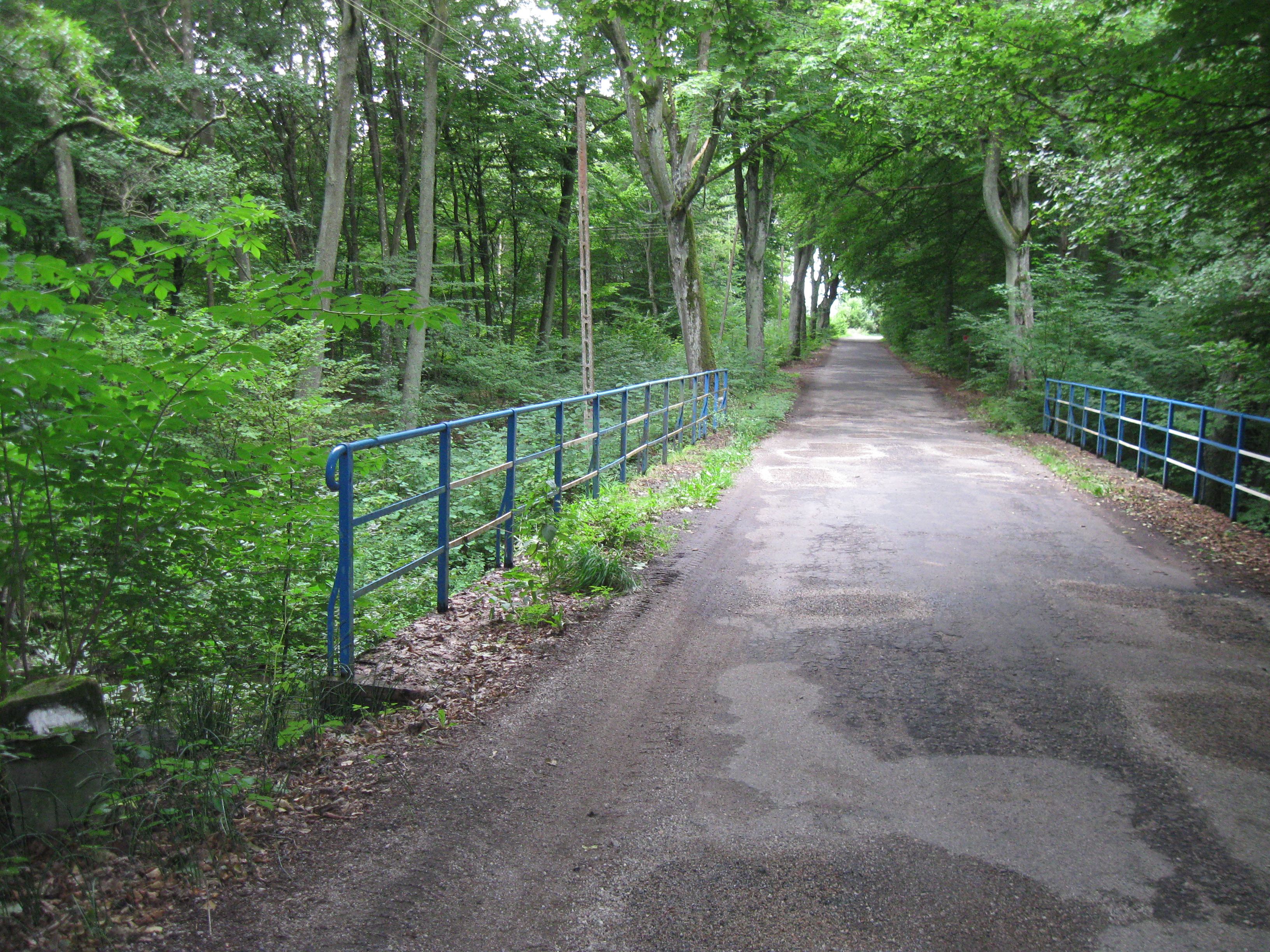 Most nad rzeką Mołstową na drodze Starnin - Grąd - Kiełpino. Kiedyś most graniczny między województwami koszalińskim i szczecińskim, dziś granica między powiatami Kołobrzeg i Gryfice